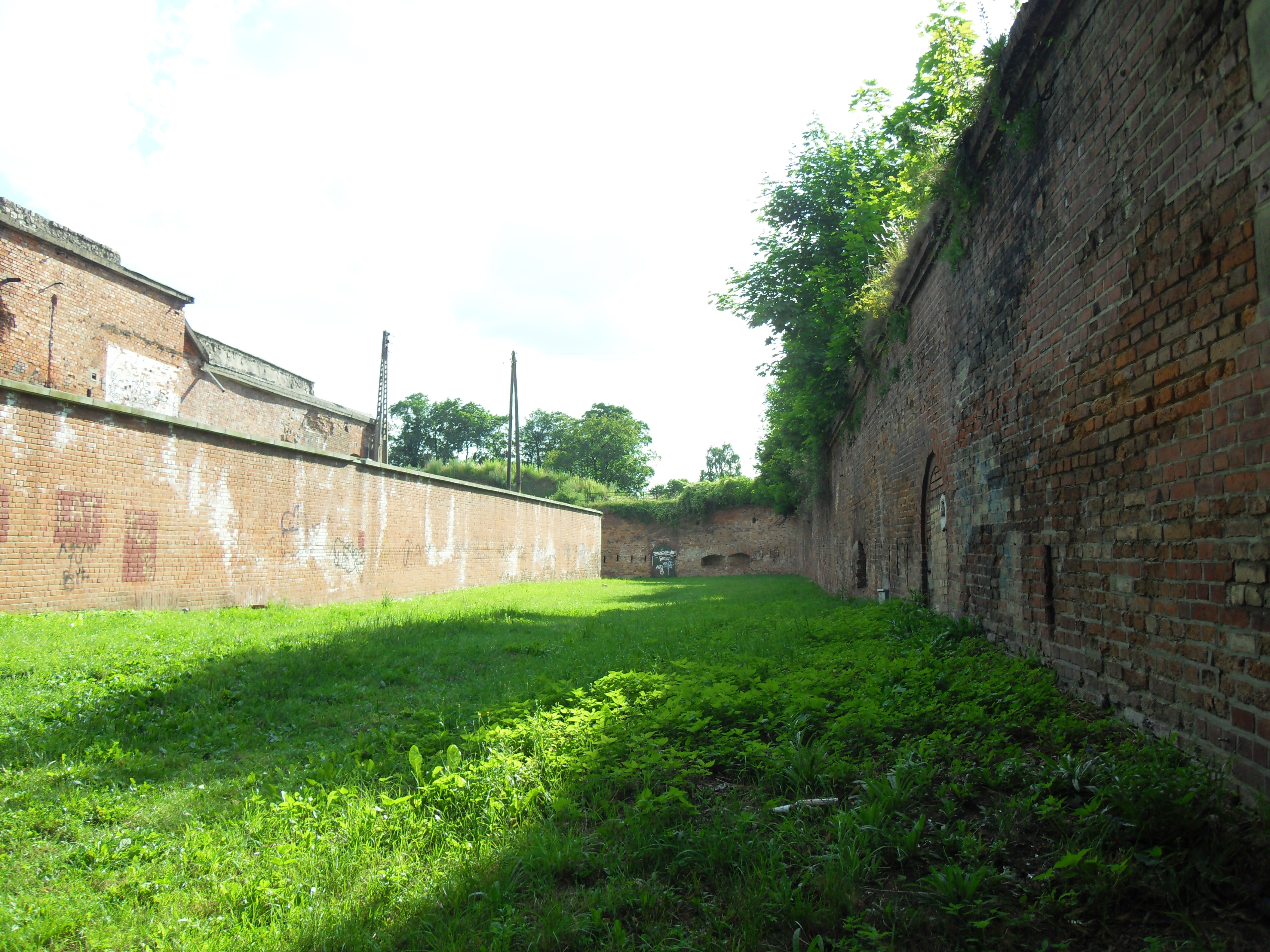 Gdańsk, Reduta Napoleońska w Grodzisku, sucha fosa.